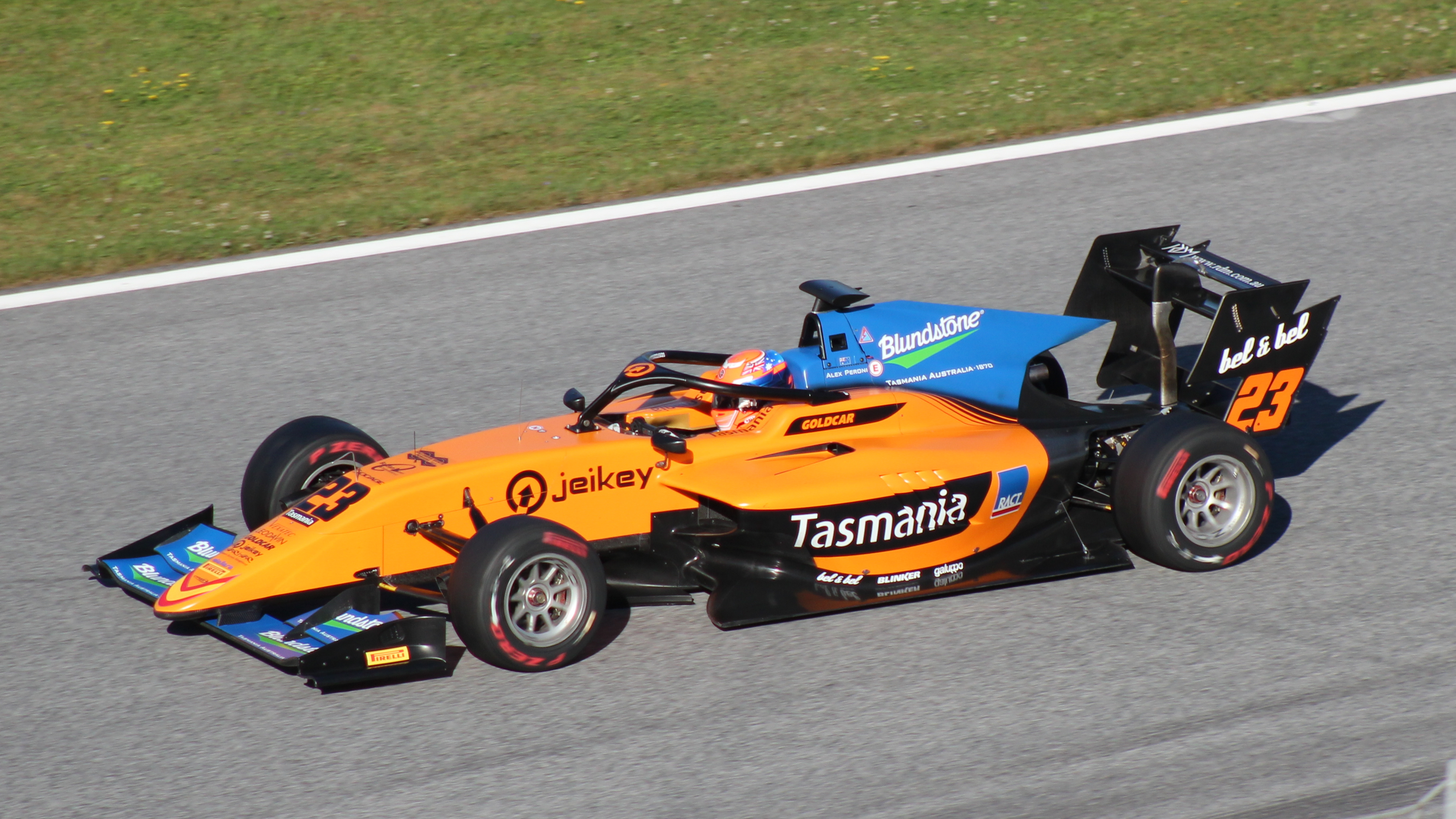 Peroni beim Rennwochenende in Österreich 2019